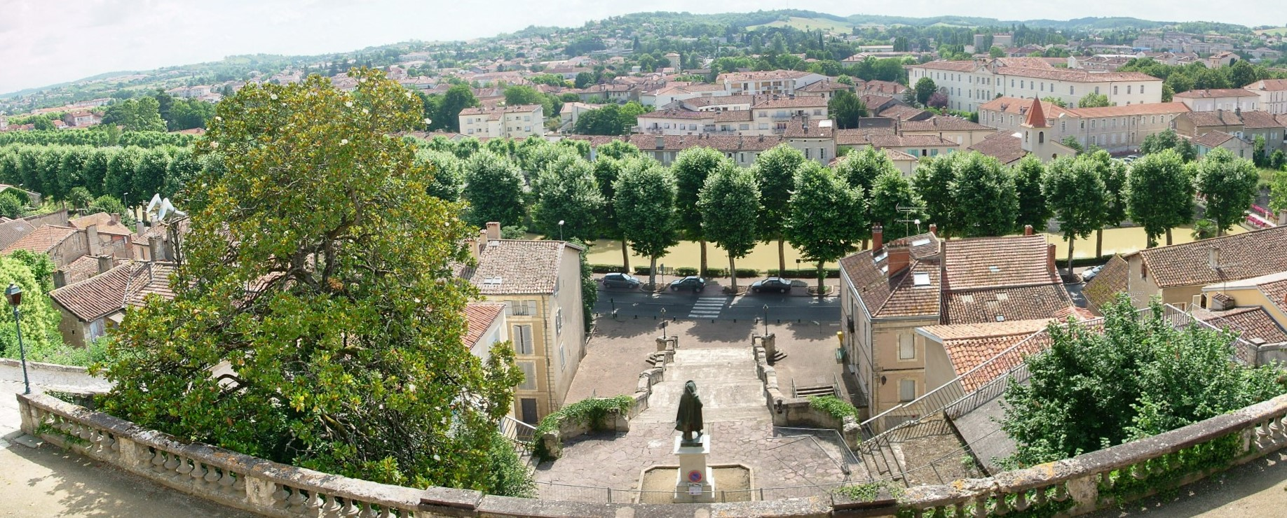 Panorama de la basse-ville d'Auch (Gers, France) depuis le haut de l'Escalier Monumental.